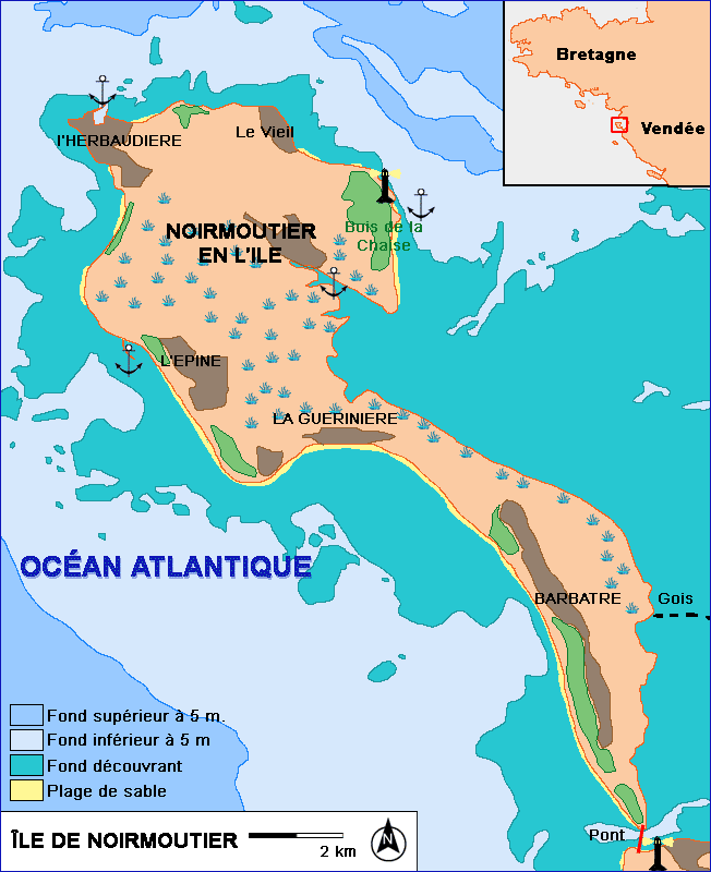 Description : Carte sommaire l'ile de Noirmoutier Date : 2006 Lieu : Ile de Noirmoutier, Vendée, France Author : Réalisation Pline